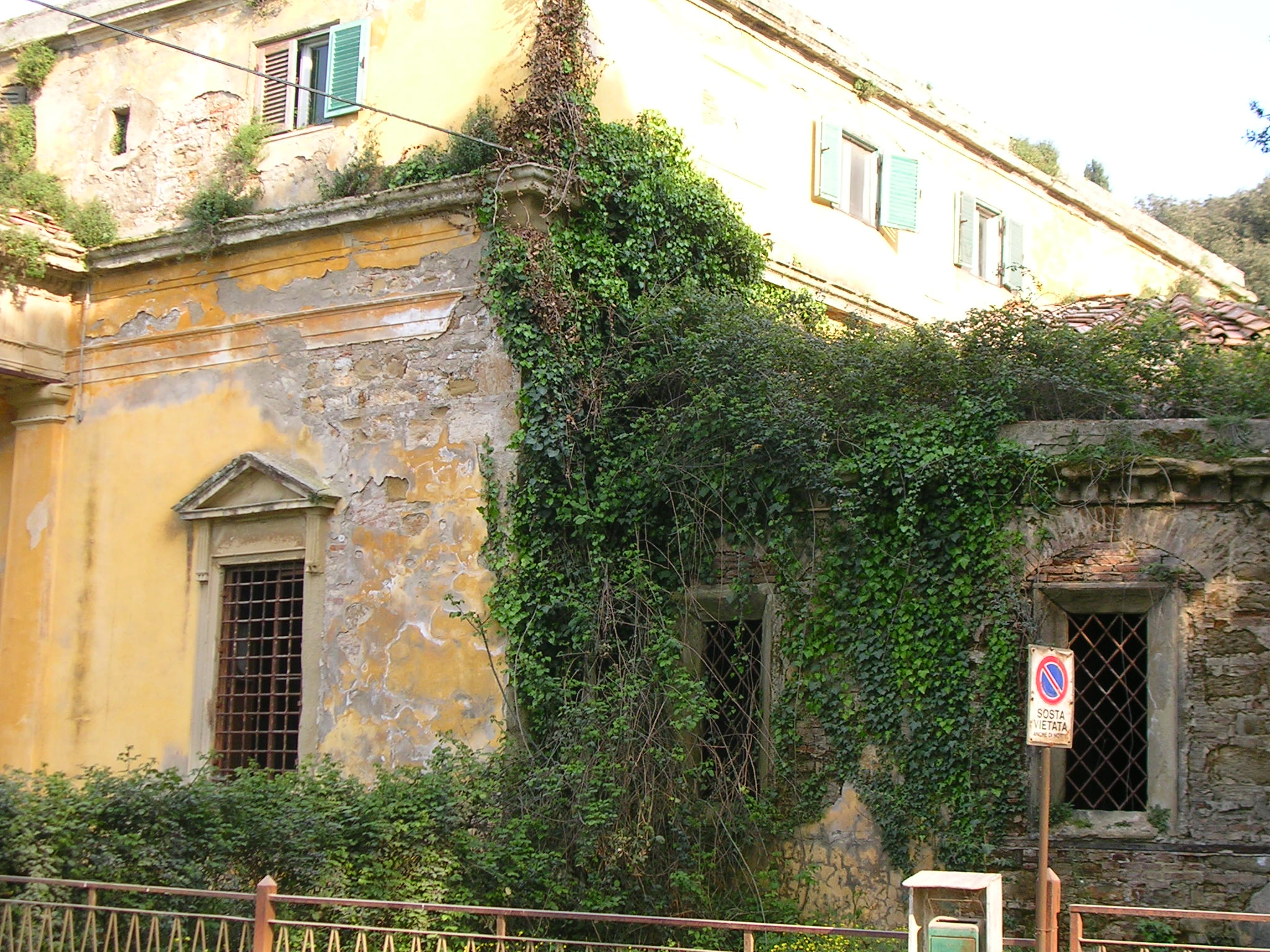 Livorno: i Bagnetti della Puzzolente (XIX secolo) progettati da Pasquale Poccianti e ora tristemente abbandonati.